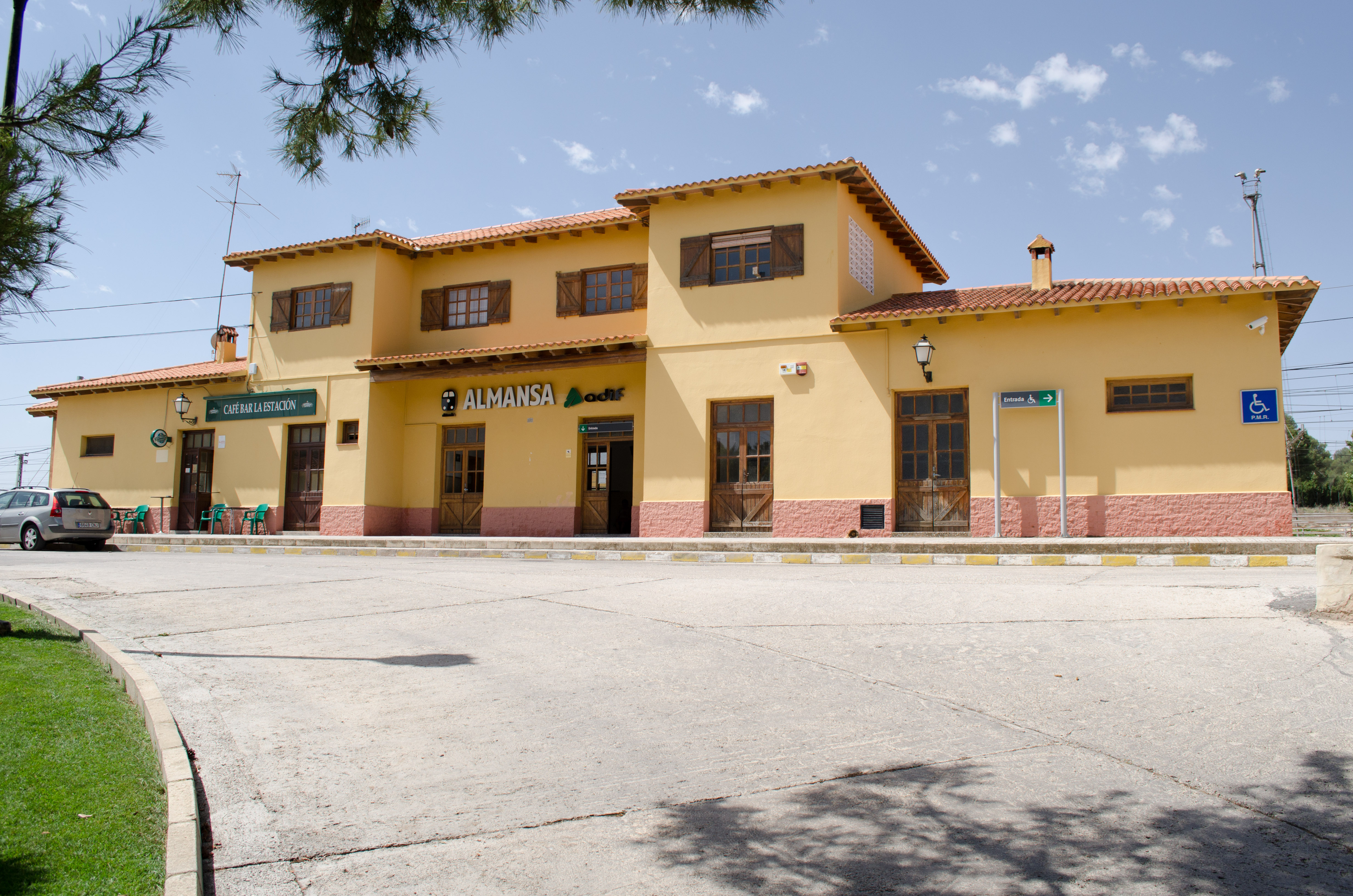 Estación de Ferrocarril de Almansa (provincia de Albacete, Castile-La Mancha).